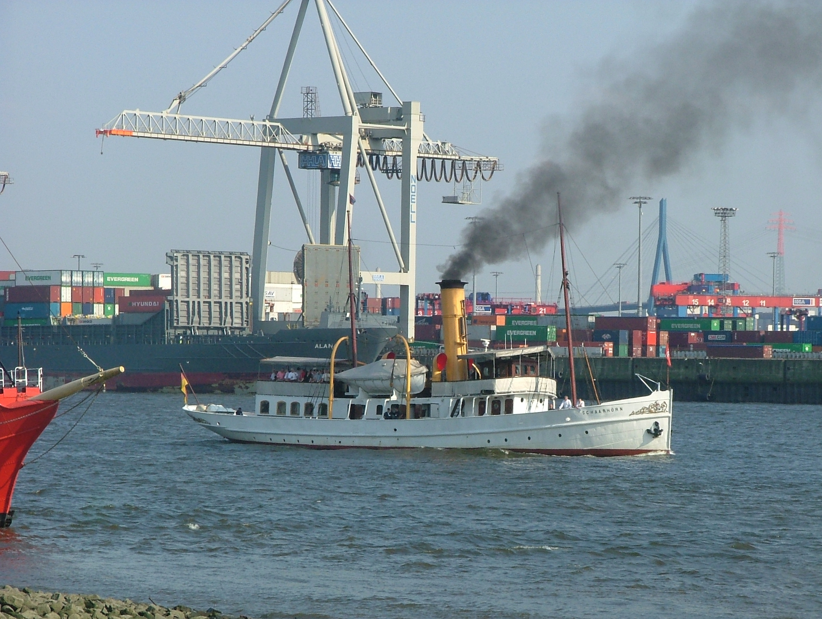 Dampfschiff Schaarhörn auf der Elbe bei Övelgönne.